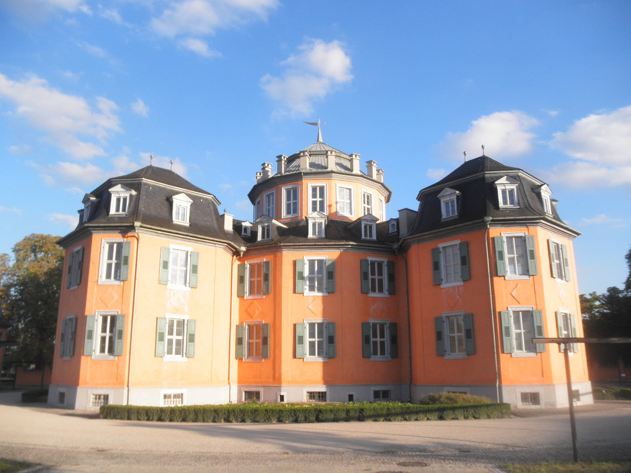 Kastelo Eremitage en Waghäusel